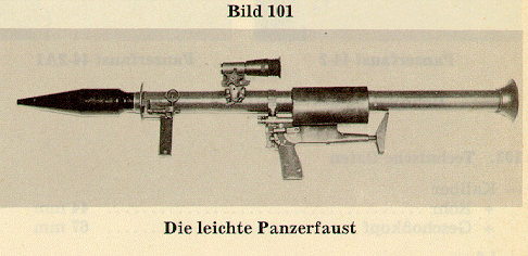 Leichte Panzerfaust 44 der Bundeswehr